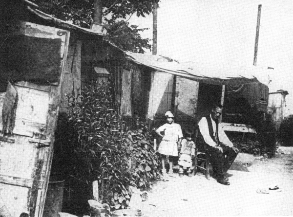 Česky: Obydlí nezaměstnaných na pražské periférii